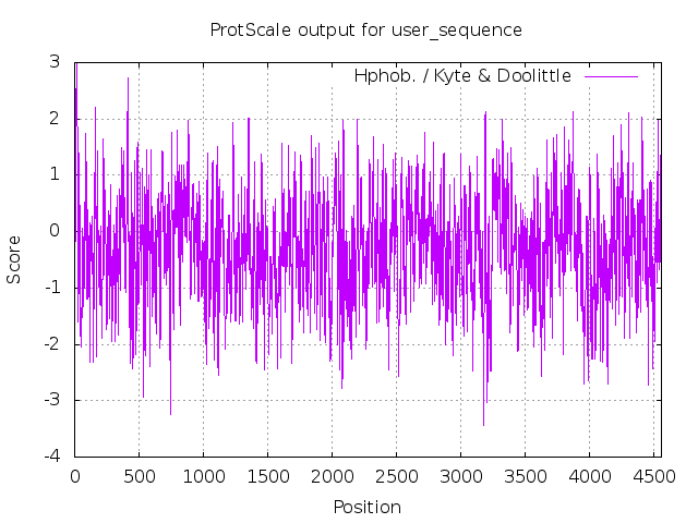 En aquesta gràfica s'observa la varietat en l'hidrofobicitat i hidrofilicitat dels 4563 aminoàcids que formen l'ApoB-100